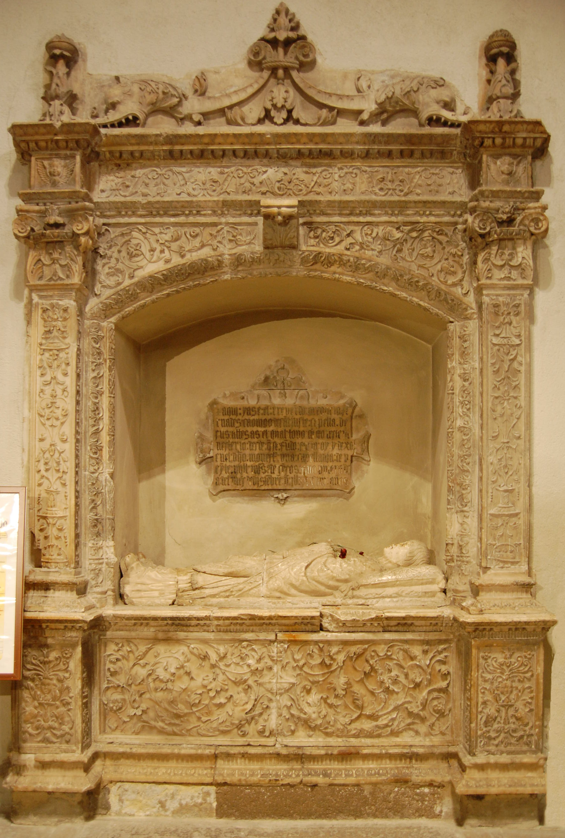 Sepulcro del canónigo Gregorio Fernández en la Catedral de Alcalá de Henares (Comunidad de Madrid - España).